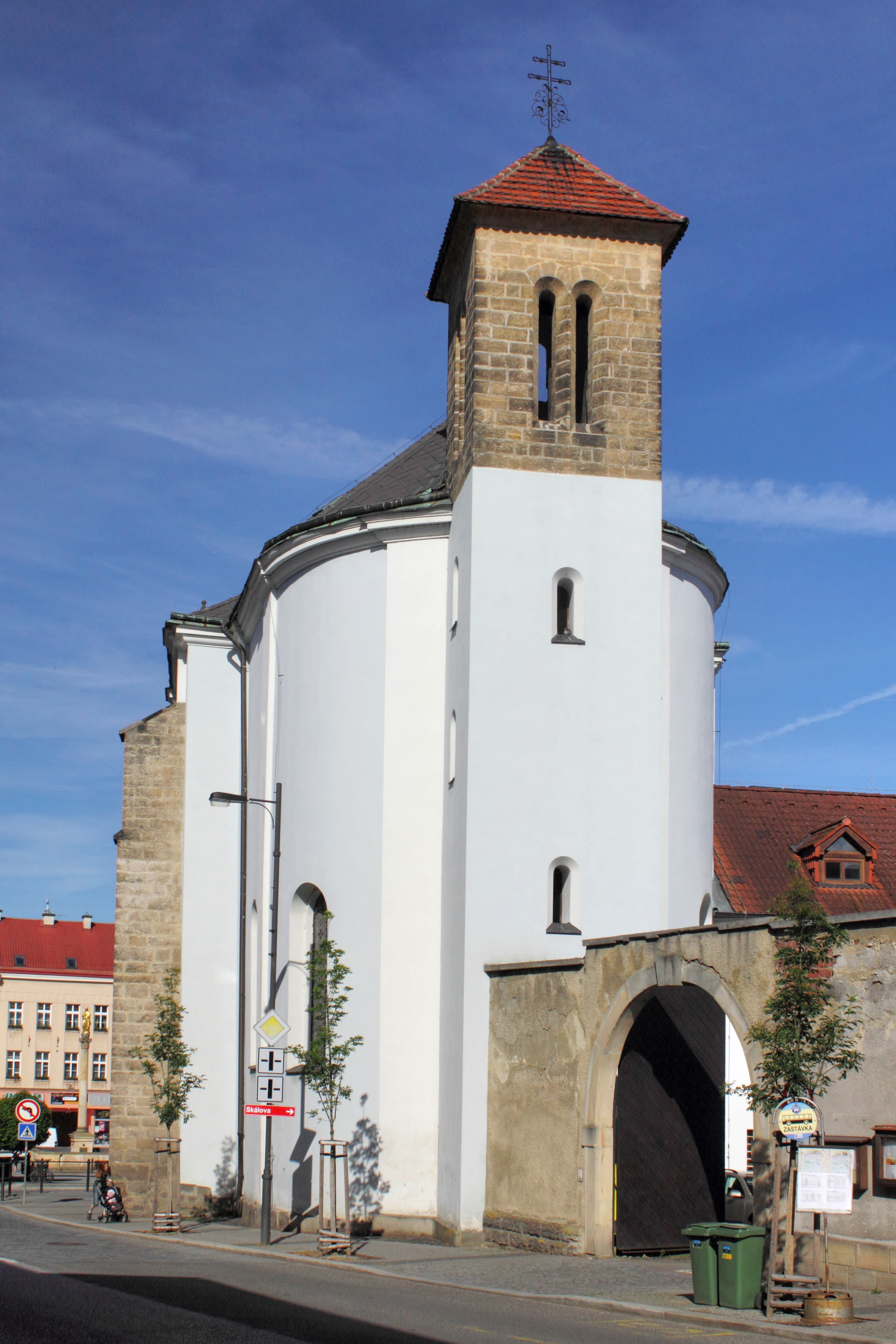 Kostel sv. Františka z Assisi, nám. Českého ráje, Turnov